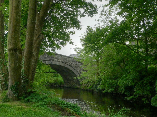 The Old Bridge, Pontrhydfendigaid